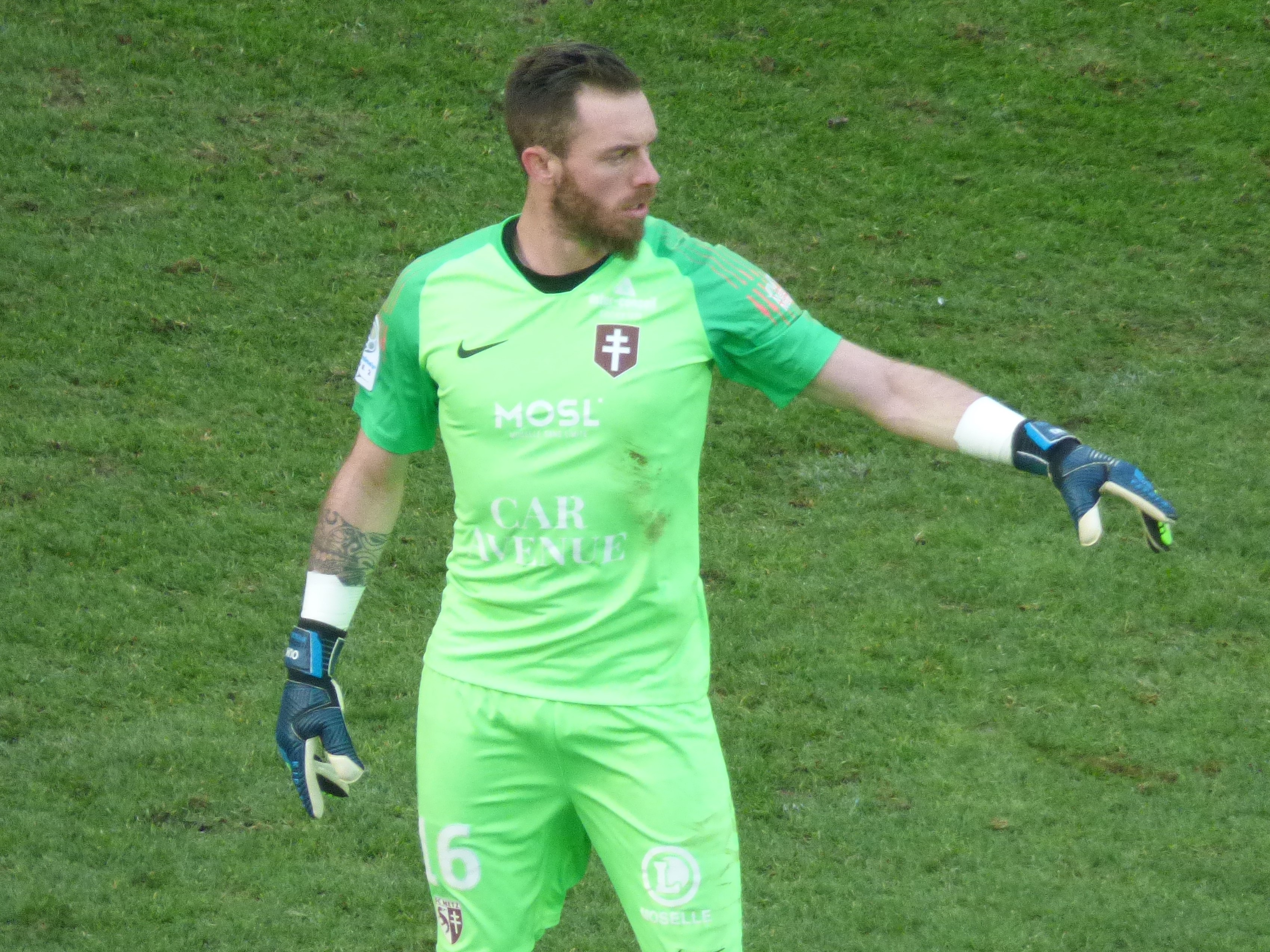 Alexandre Oukidja pendant le match RC Lens / FC Metz, comptant pour la vingt-quatrième journée du championnat de France de Ligue 2 2018-2019, le 9 février 2019, au Stade Bollaert-Delelis.